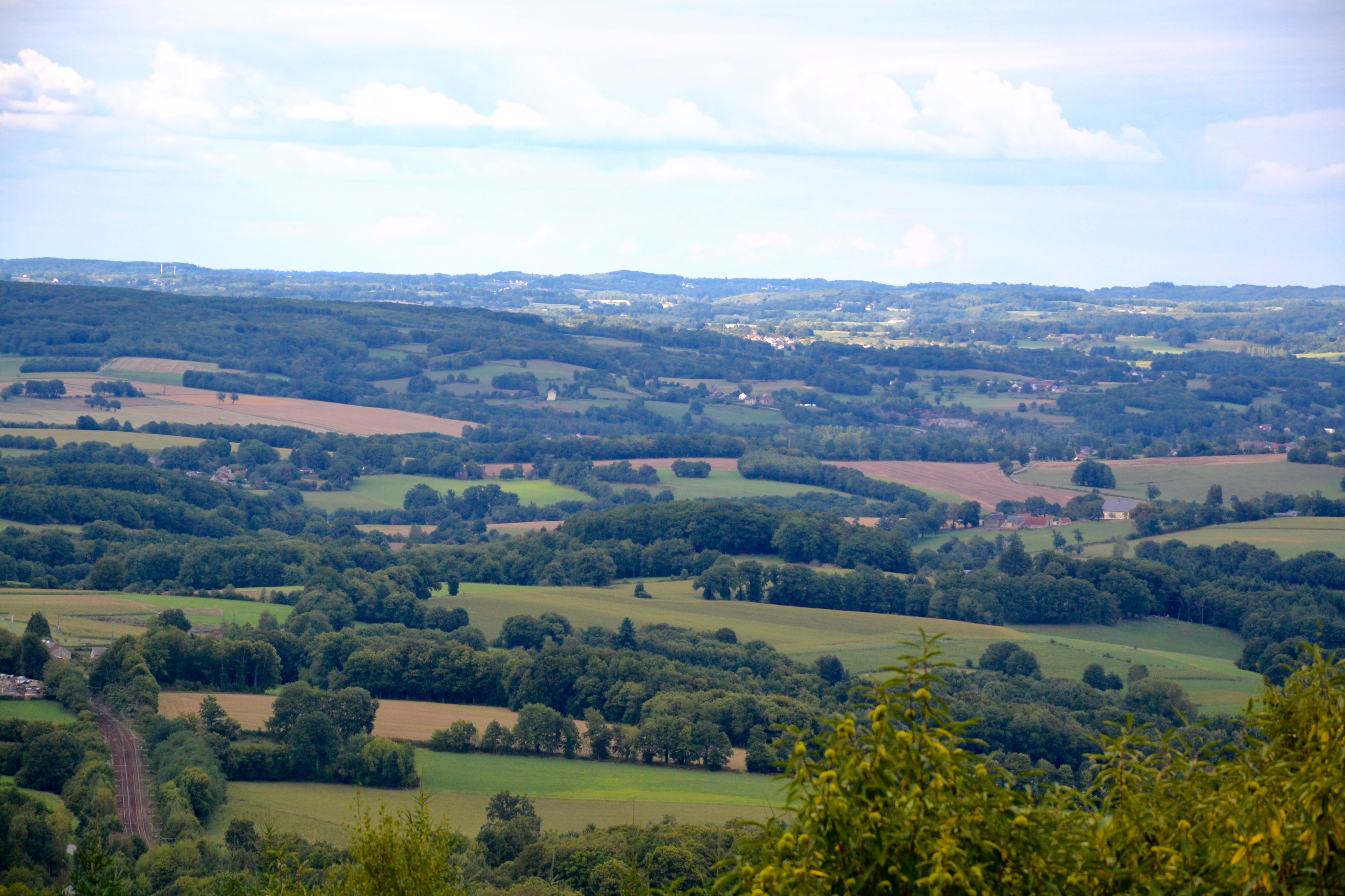 Paysage du plateau de la Souterraine, vu depuis les hauteurs des monts d'Ambazac (Bersac-sur-Rivalier, Haute-Vienne, France).